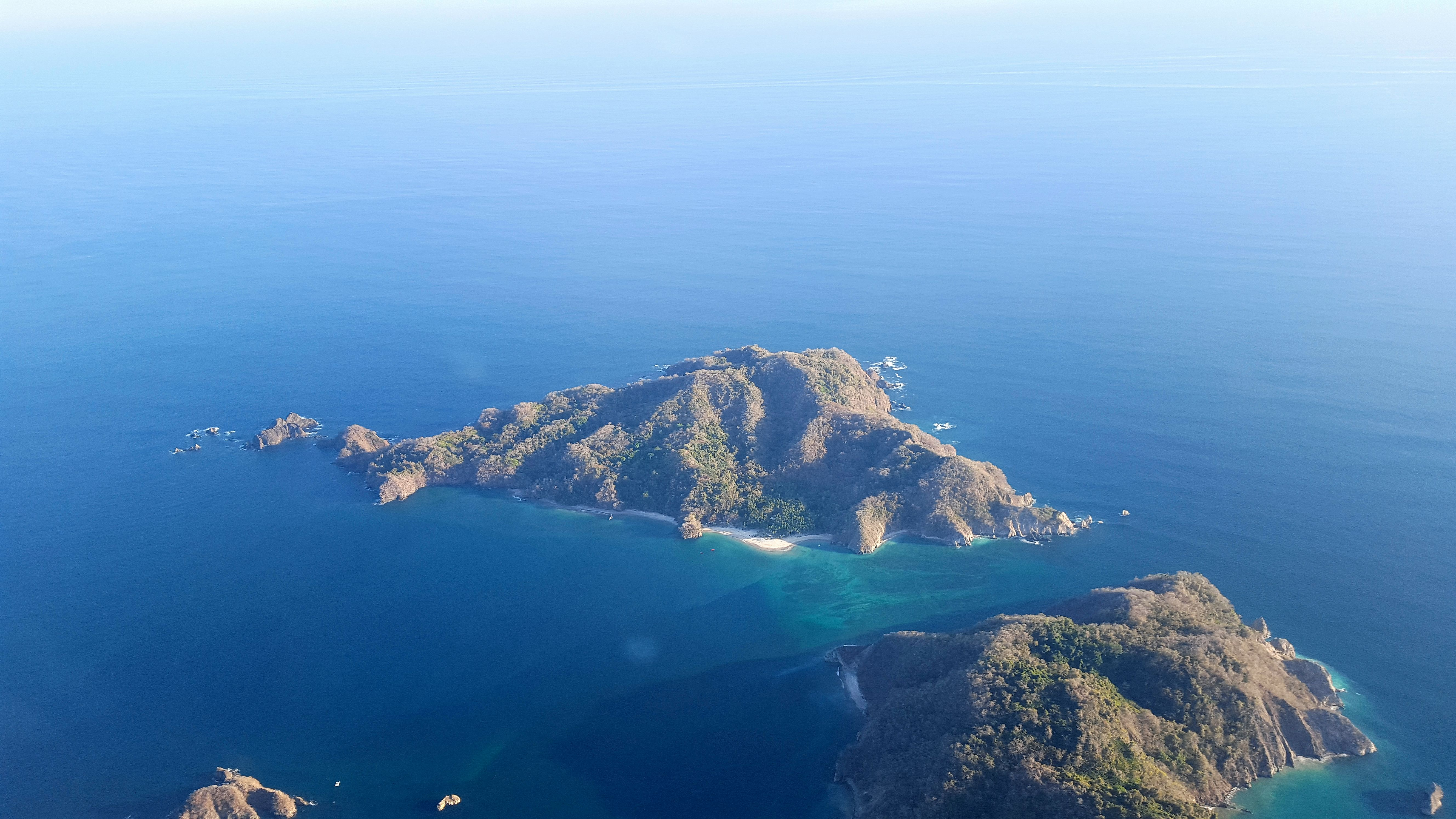 Isla Tortuga